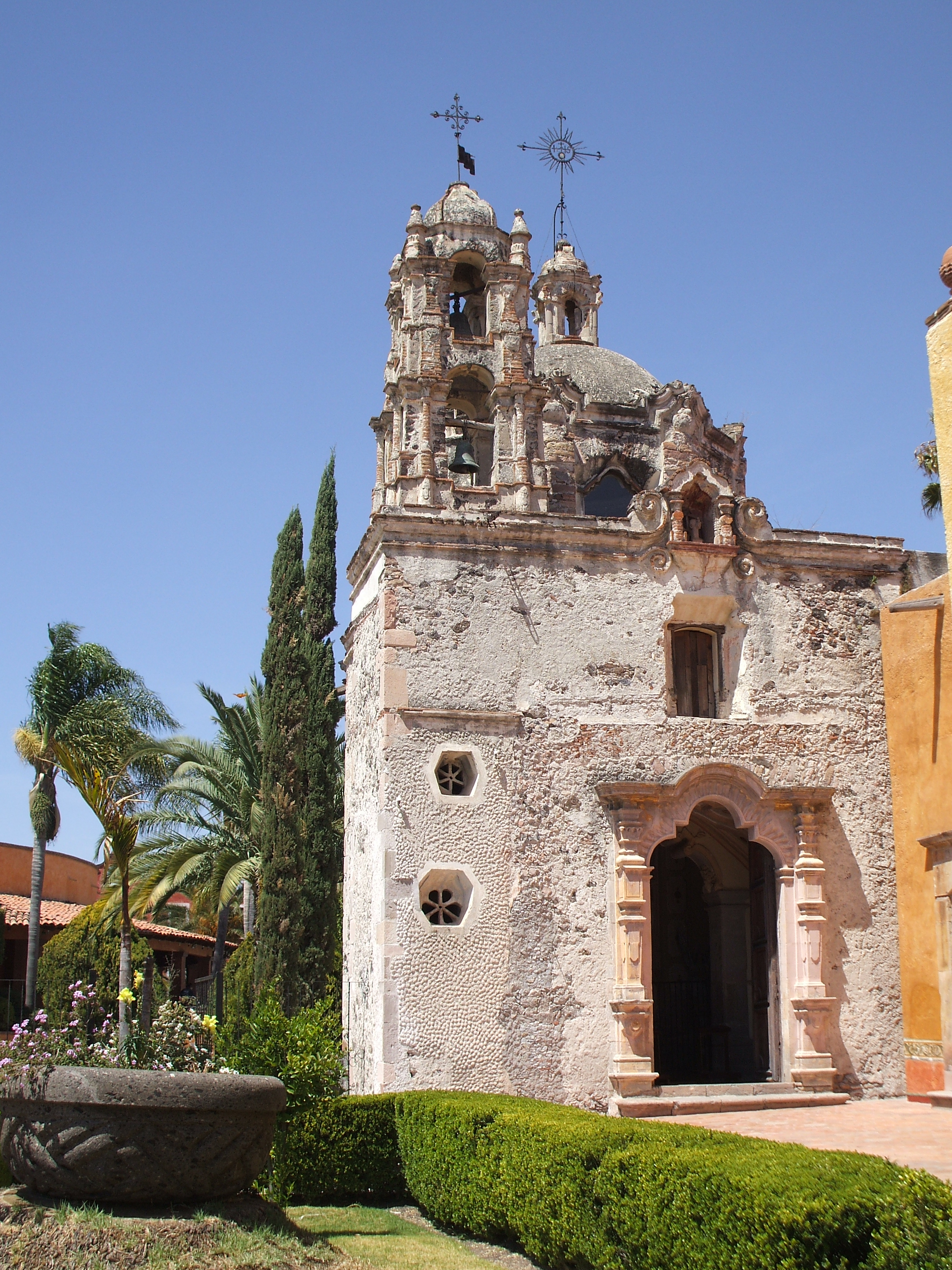 Fachada del retablo frontal al estilo barroco del siglo XVIII de la Capilla de la Ex-Hacienda Juriquilla, Santiago de Querétaro , QRO.